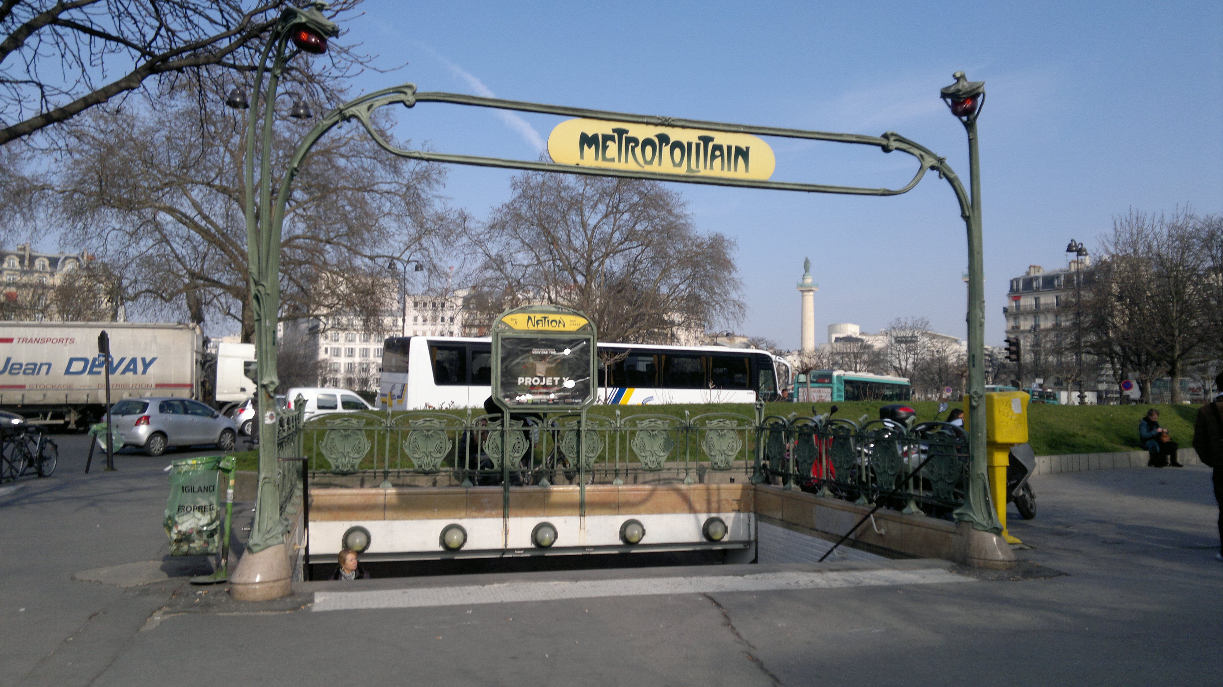 Édicule Guimard de la station de métro Nation : Place de la Nation, côté avenue Dorian